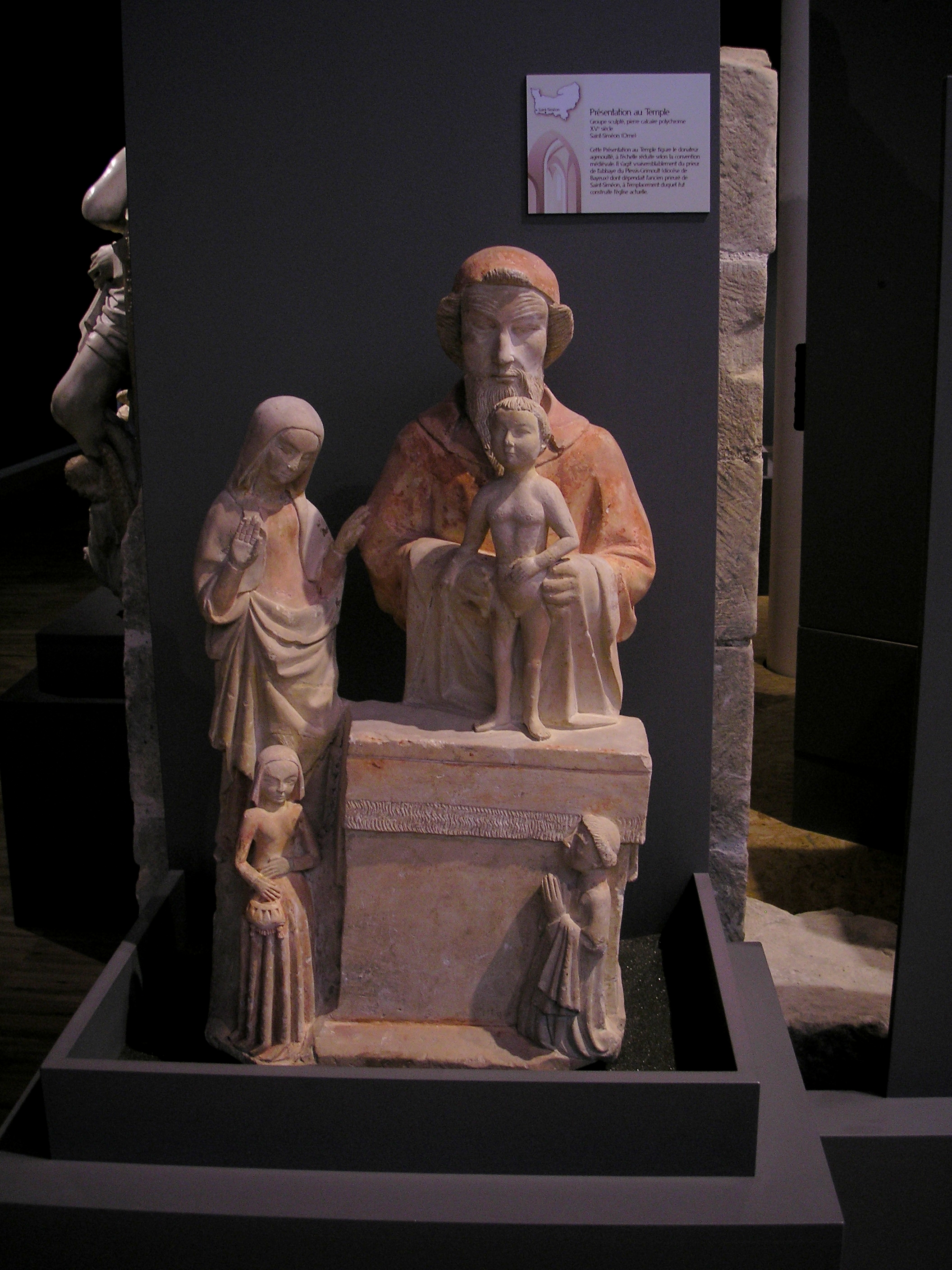 Statue de la Présentation au Temple du XVe siècle de l'église de Saint-Siméon (Normandie, France) présentée à Caen à l'occasion de l'exposition Chefs-d'œuvre du gothique en Normandie en 2008.